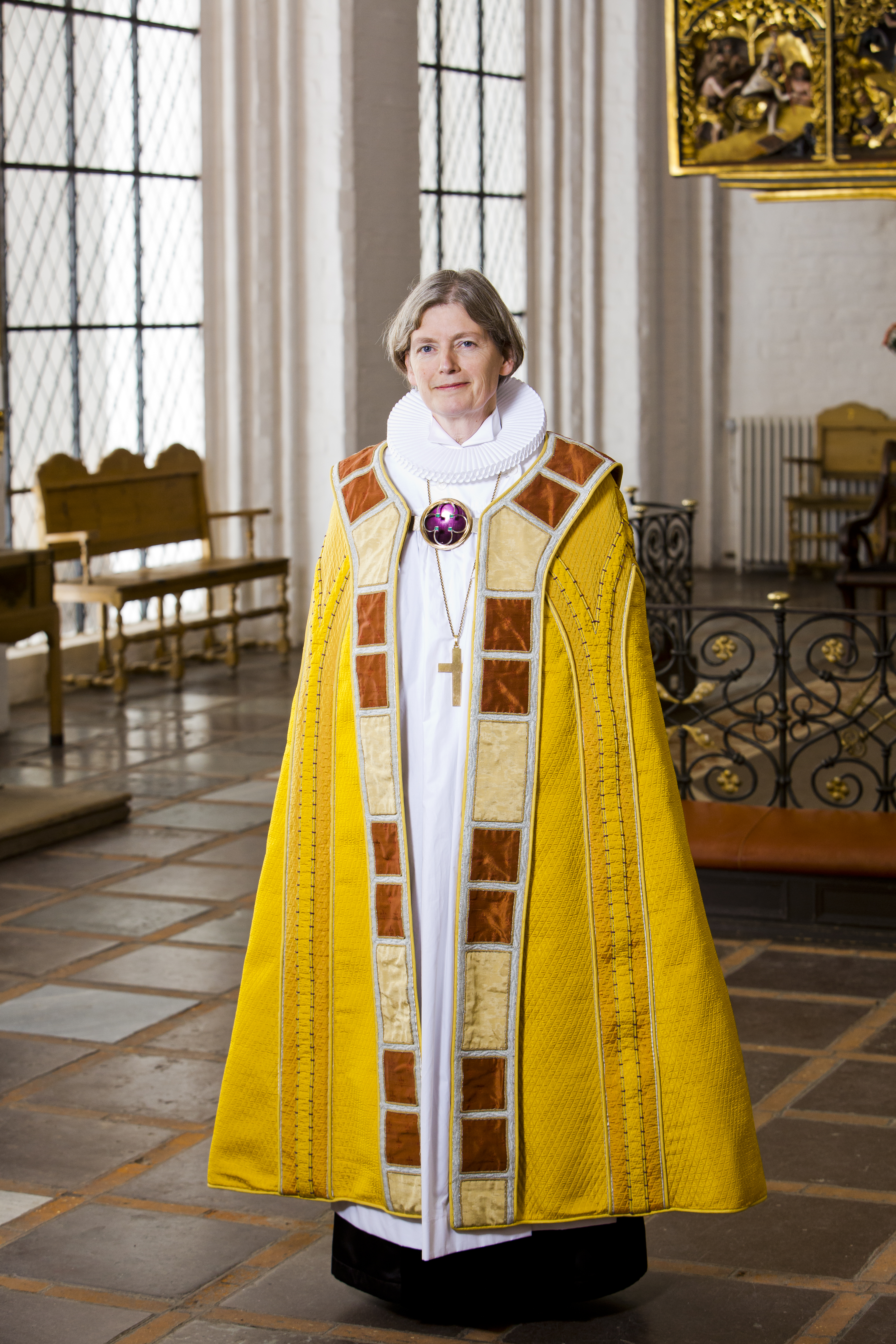 Biskop Tine Lindhardt fra Fyens Stift.